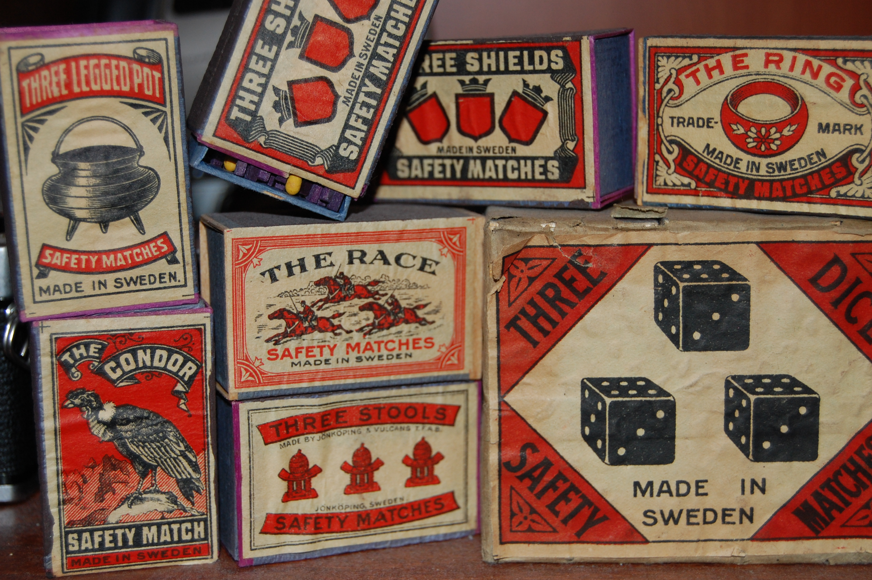 Tändsticksaskar levererade av Uddevalla tändsticksfabrik 1919